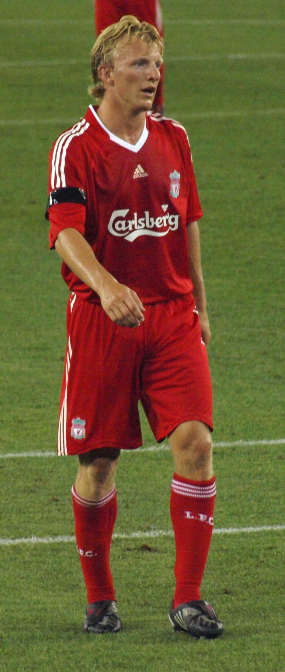 Dirk Kuyt con la camiseta del Liverpool en el partido de presentación del Estadio de Cornella-El Prat disputado ante el RCD Español de Barcelona.